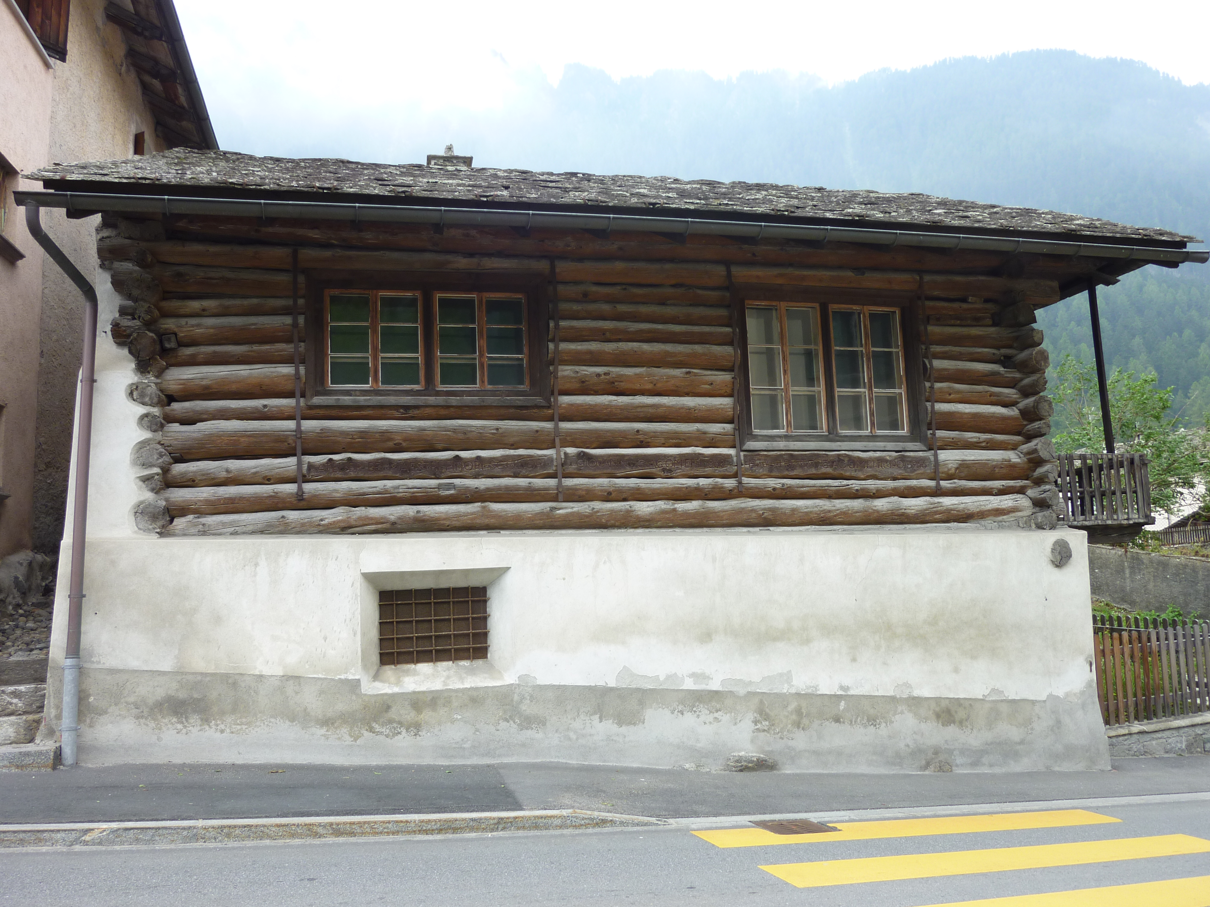 Atelier von Alberto und Giovann Giacometti in Stampa GR